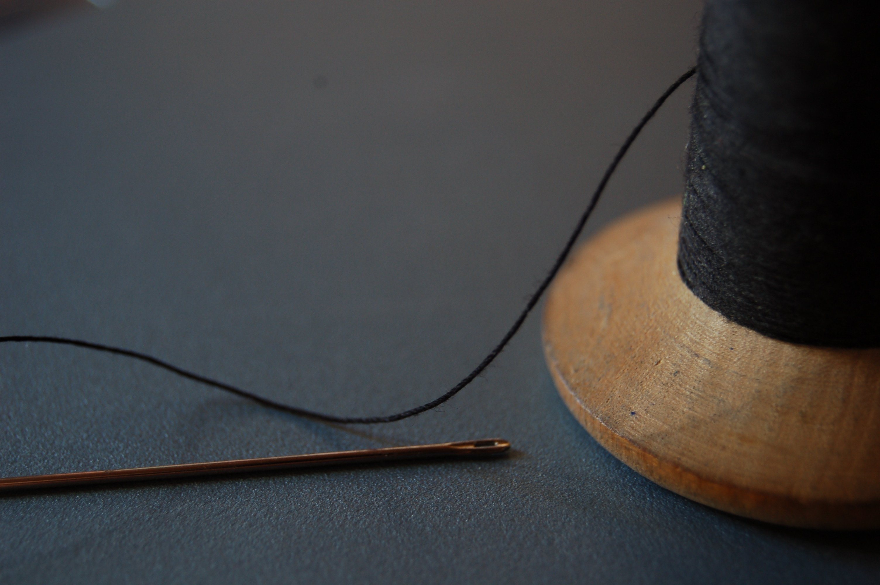 fil et aiguille